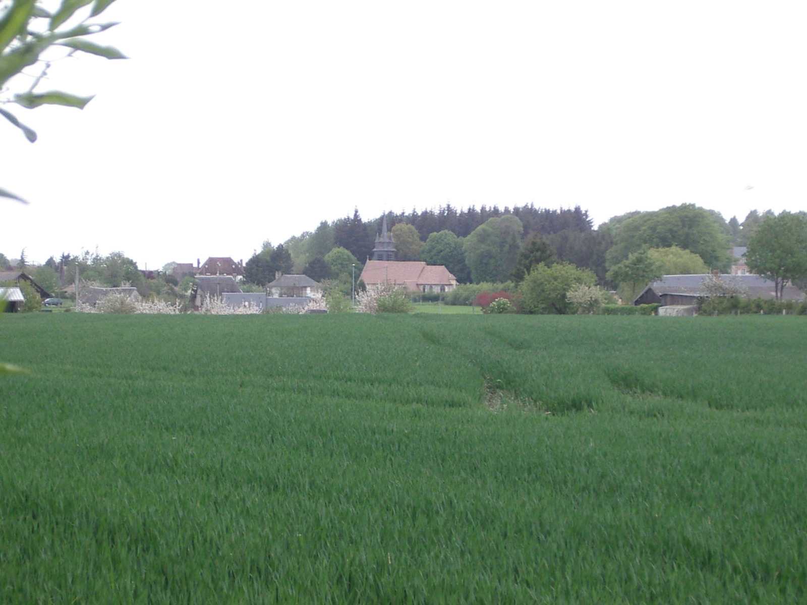 Vue du Village de Granchain (France, Eure)